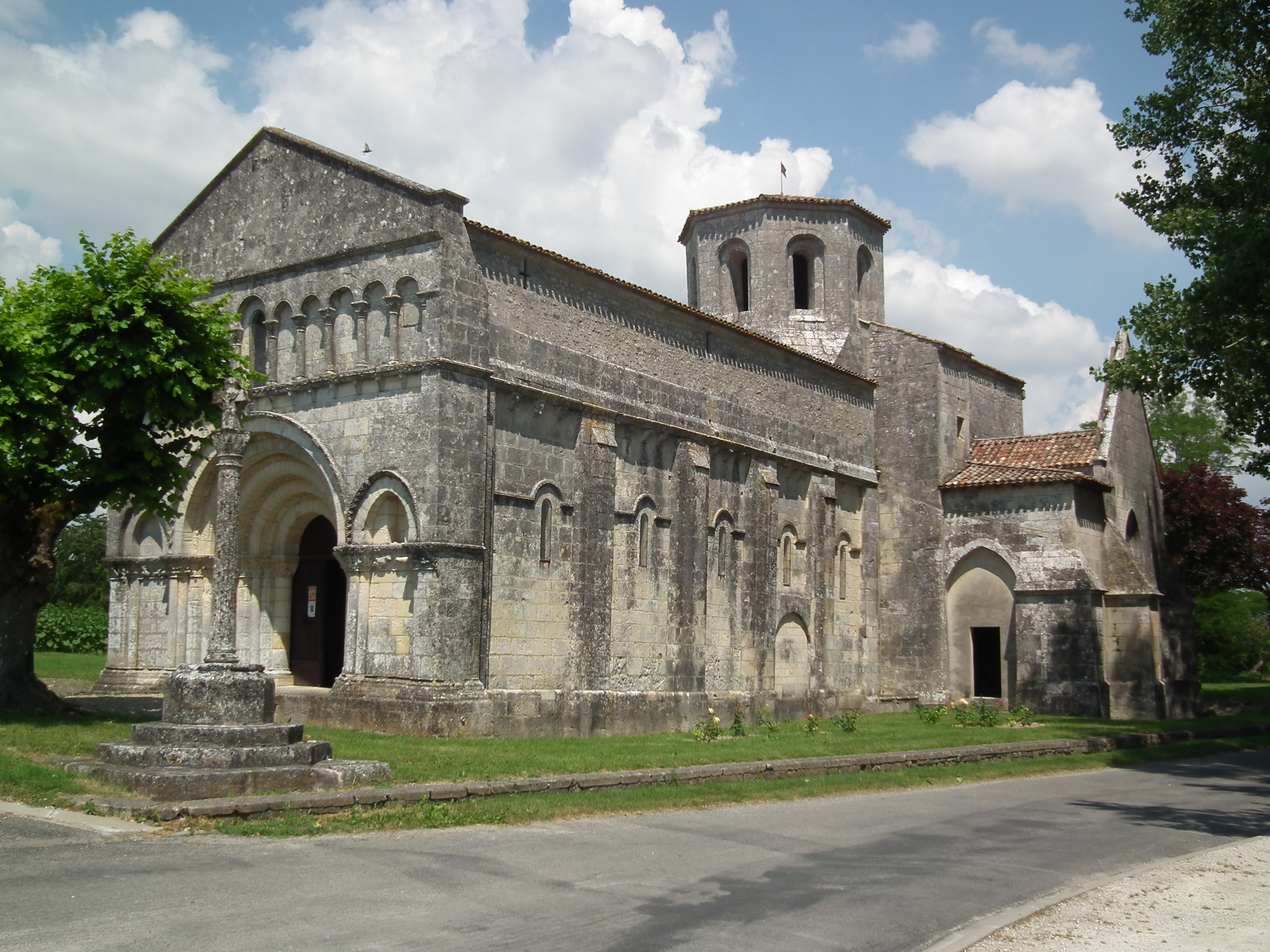 L'église de Biron